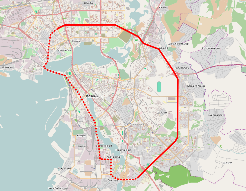 Схема маршрута скоростного трамвая в Казани. Сплошная линия - строящийся участок, пунктирная - планируемый